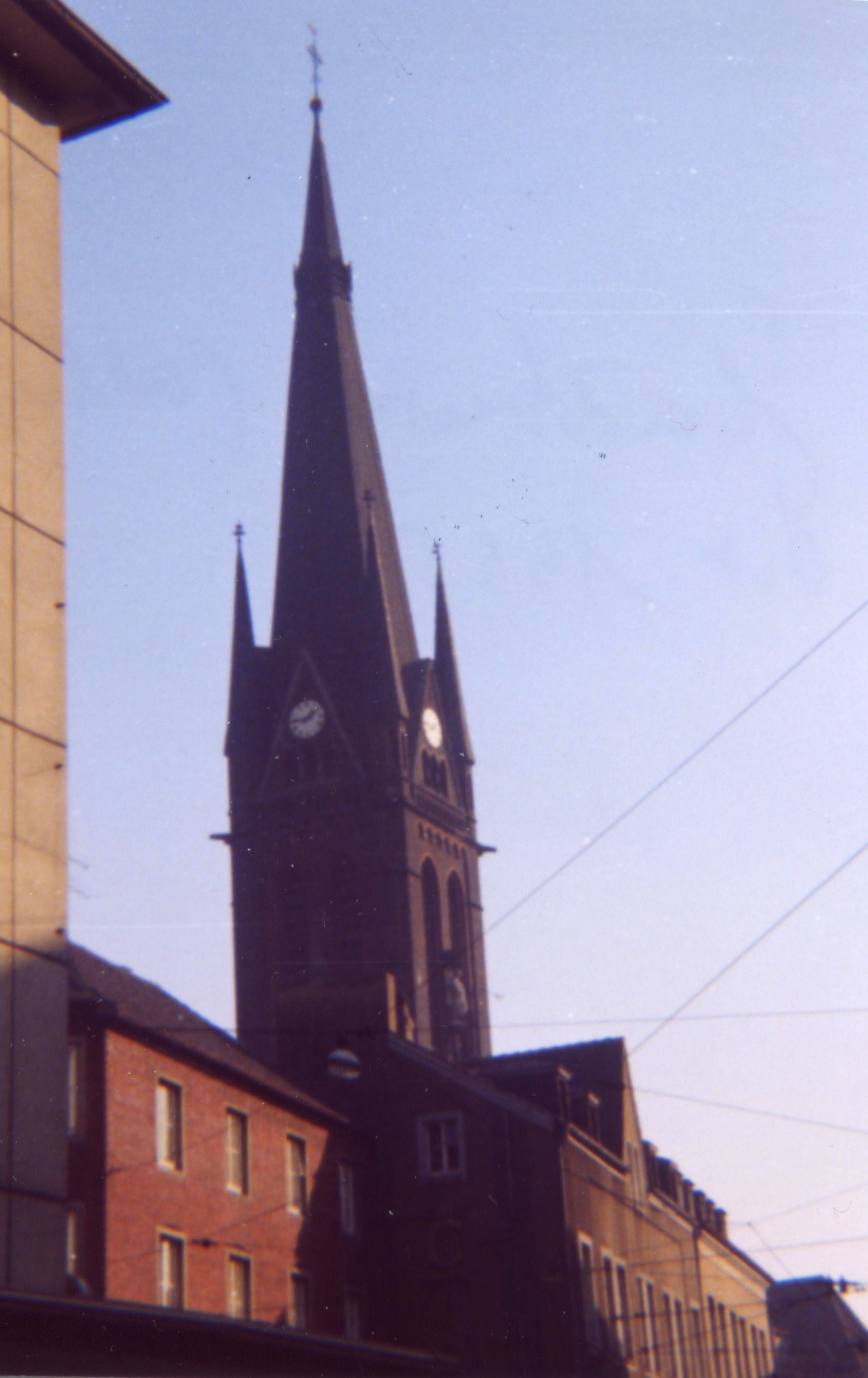 Église Saint-Lambert à Gladbeck